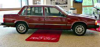 Volvo 760 GLE, sedd från sidan, Volvo Museum Arendal